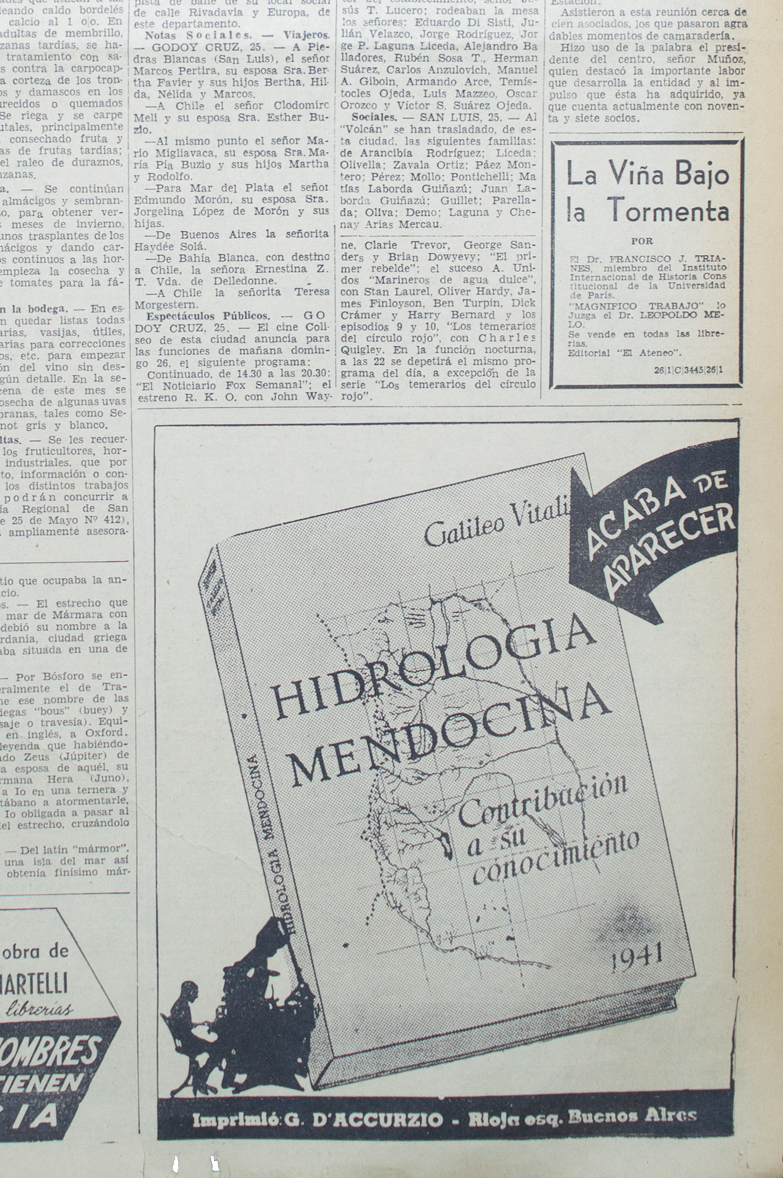 Anuncio en diario Los Andes (Enero 26 de 1941) sobre el libro "Hidrología Mendocina. Contribución a su conocimiento" de Galileo Vitali.